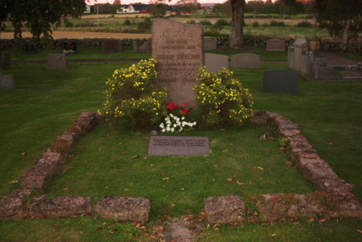 Gravplats tillhörande folklivsforskaren Johan Götlind (1887-1940), och hans hustru Märta Tamm-Götlind, på Göteve kyrkogård utanför Falköping.